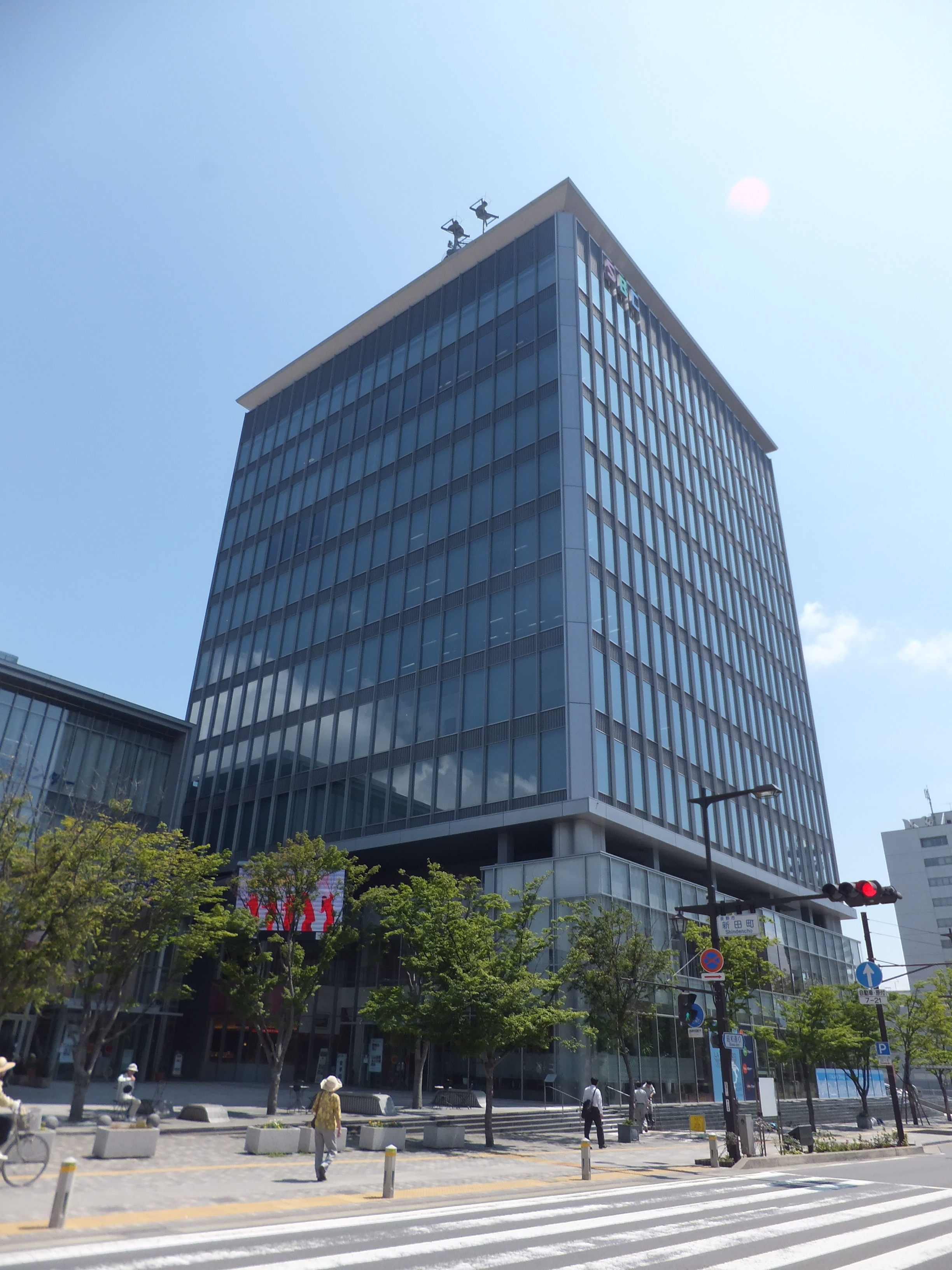 長野市中心街の再開発複合施設TOiGO （トイーゴ）。SBC信越放送本社棟。